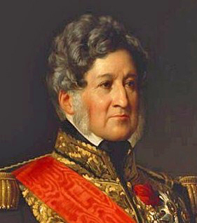 Portrait of the King of the french.